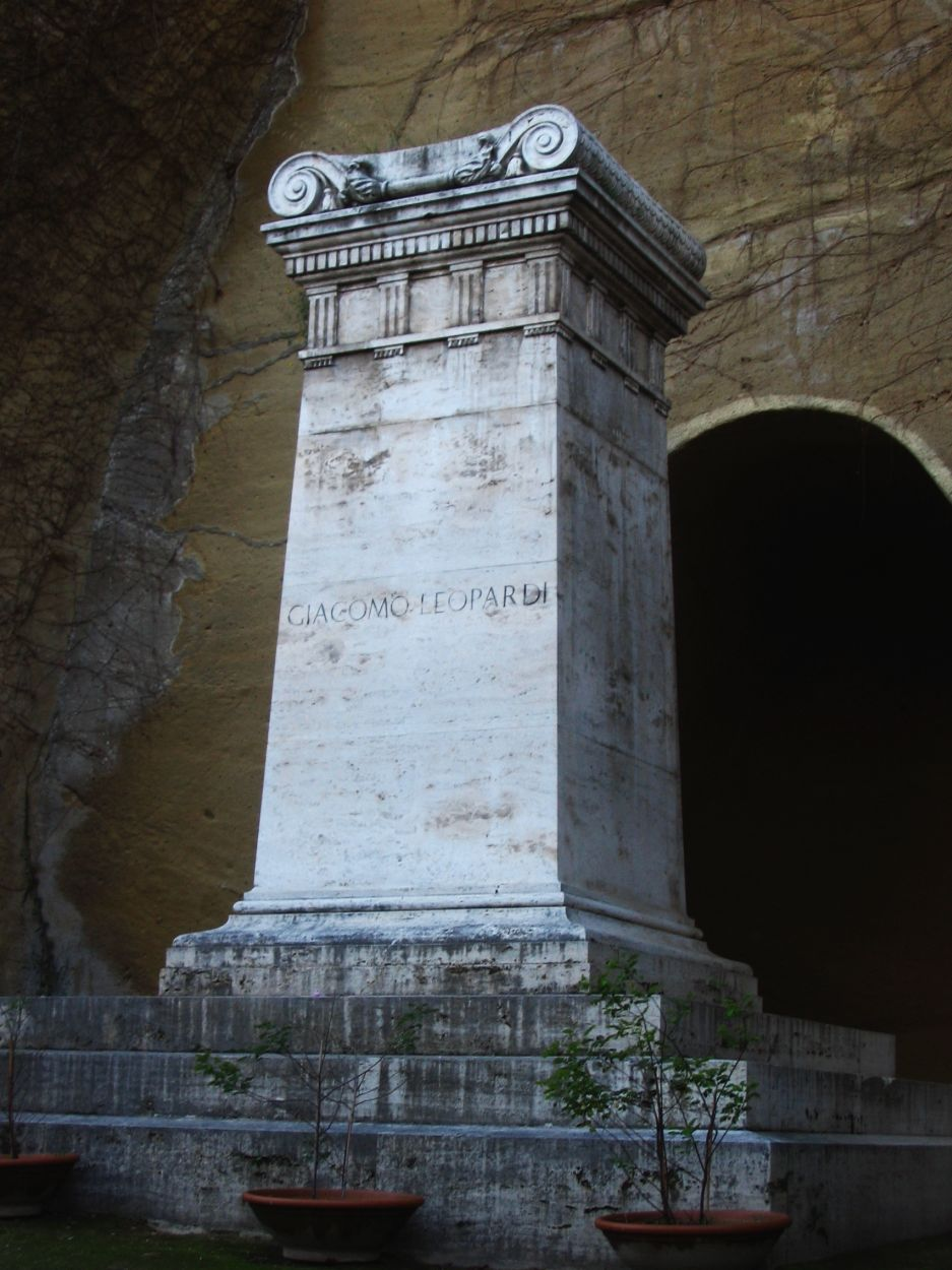 Tomba (o monumento) di Giacomo Leopardi, Parco Virgiliano - Napoli - Naples (Italy)